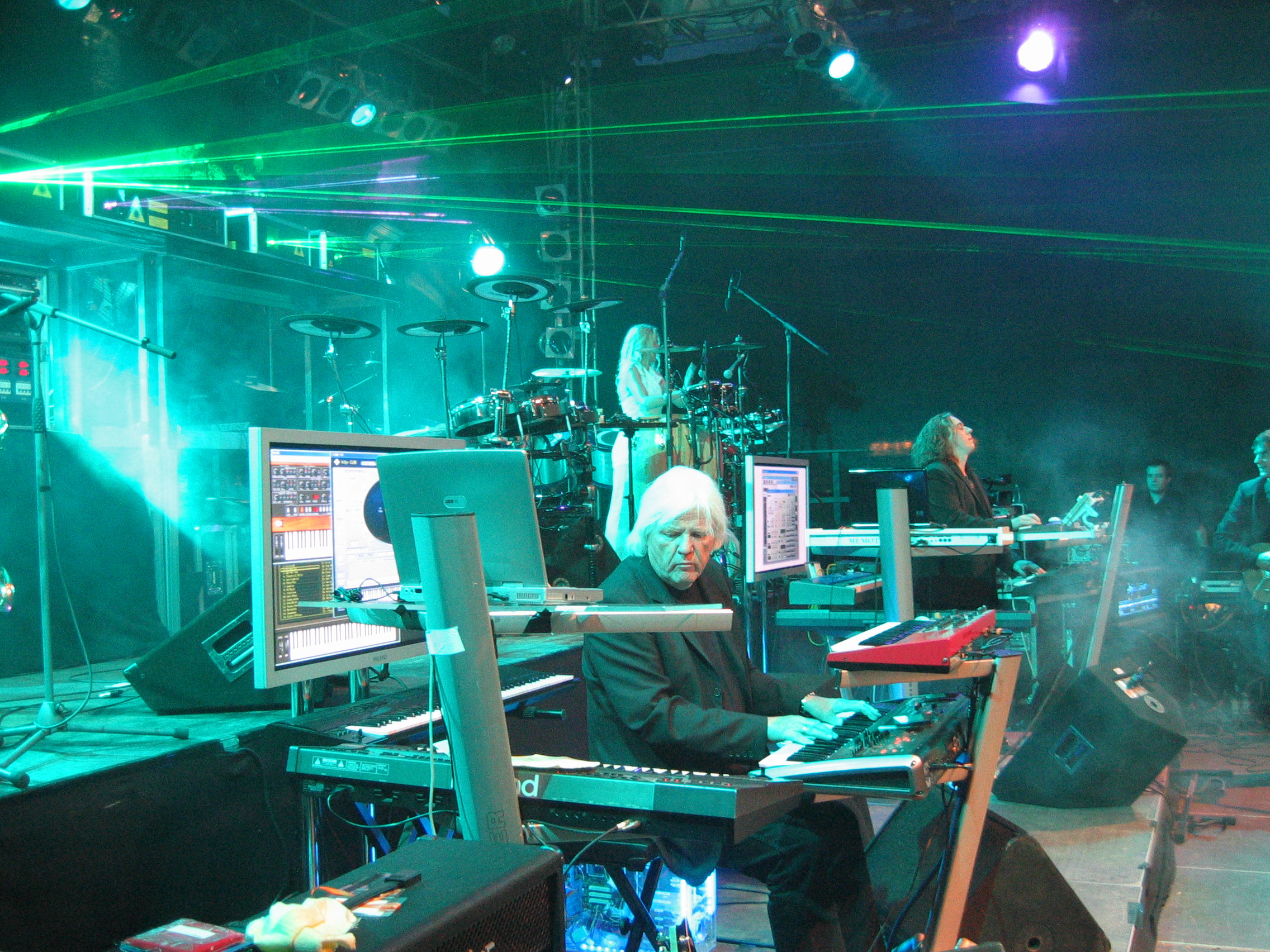 Tangerine Dream beim Konzert in Eberswalde